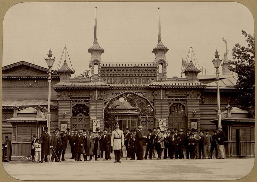 Ленинградский зоопарк. С 1910 года хозяином зоопарка стал знаменитый антрепренер С.Н.Новиков. При Новикове, по проекту архитектора П.Д. Струкова был построен новый вход в зоосад, отремонтированы старые клетки, построены новые, вырыт новый пруд для водоплавающих птиц